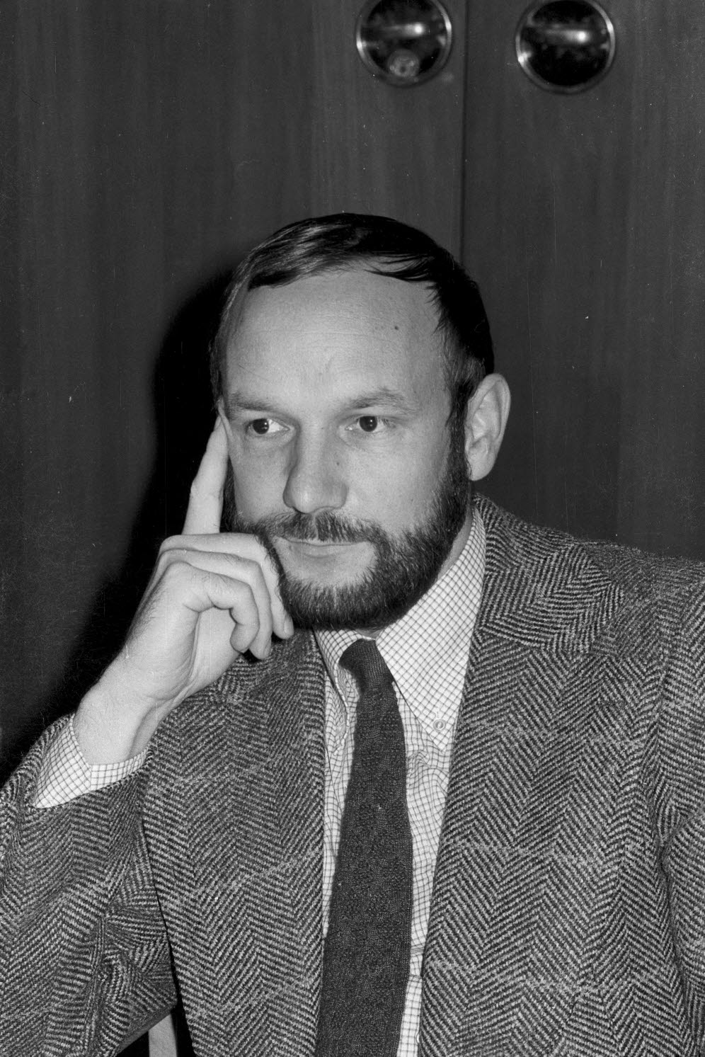 auf der SPD-Kreiswahlkonferenz.